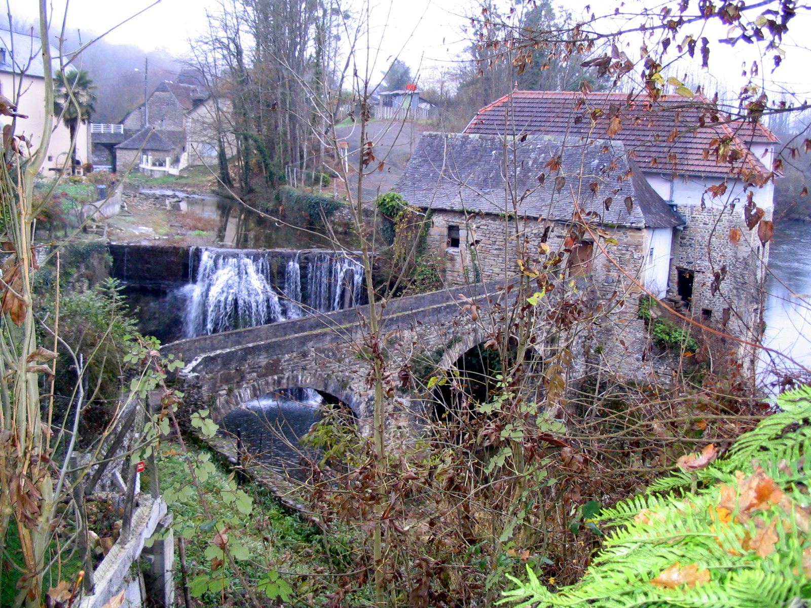 Vue du moulin de Saucède (Pyrénées Atlantiques) Pyrénées).